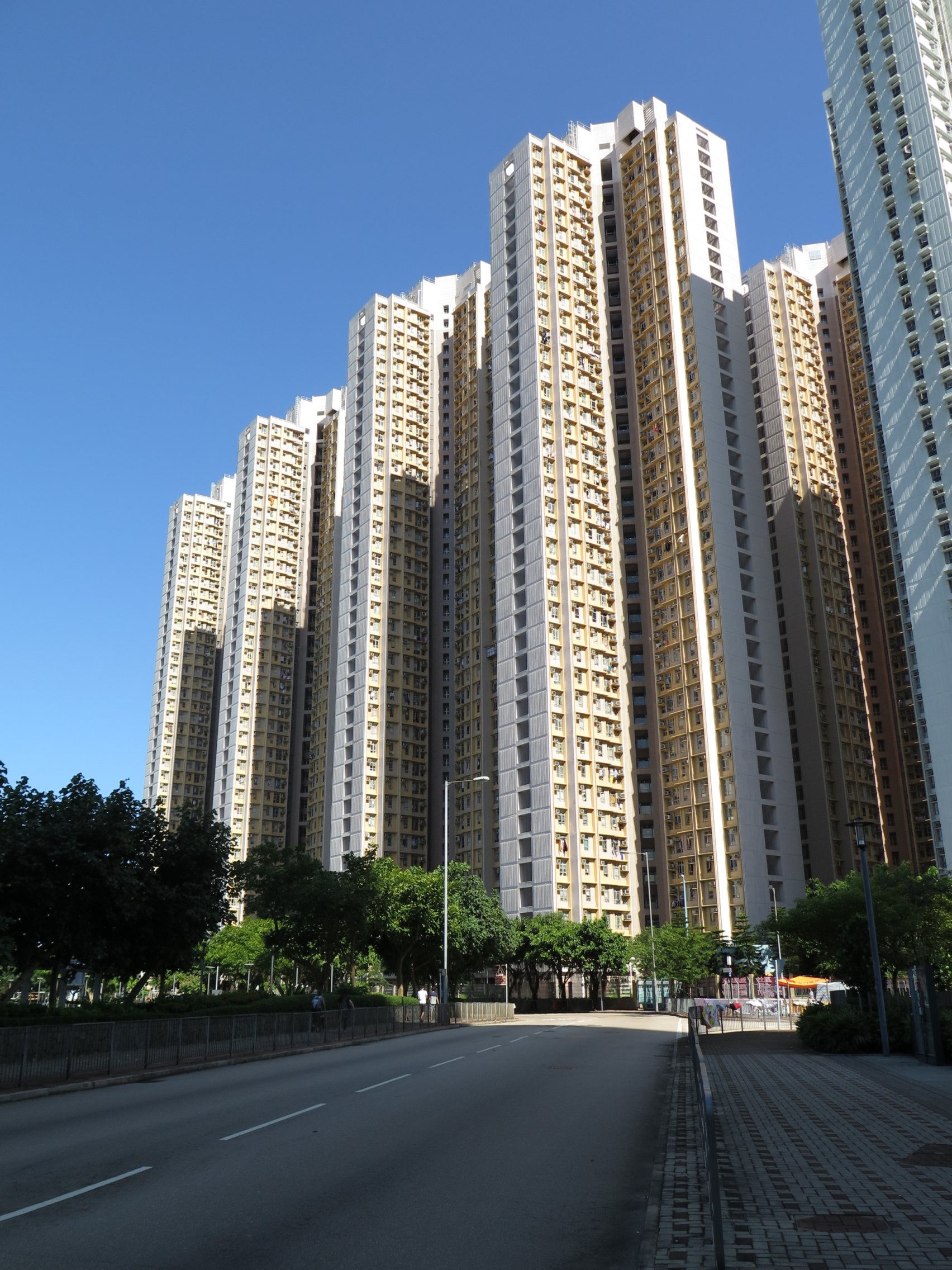 Tung Yuk Court